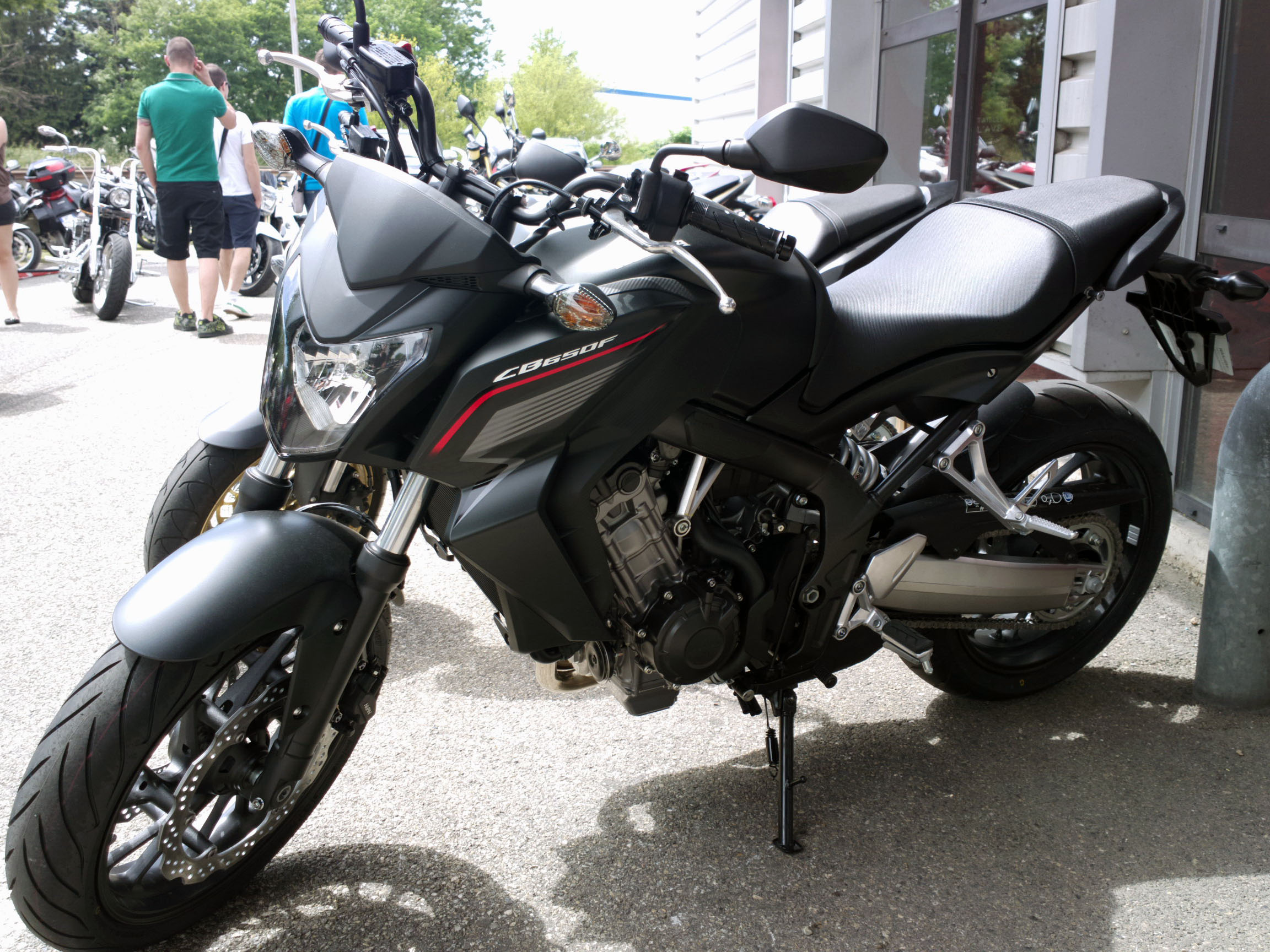 Une Honda CB 650 F 2014